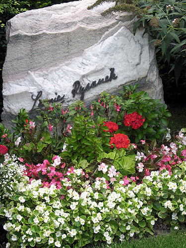 Wien Zentralfriedhof, Ehrengrab, Leonie Rysanek Photo made by user -- skINMATE